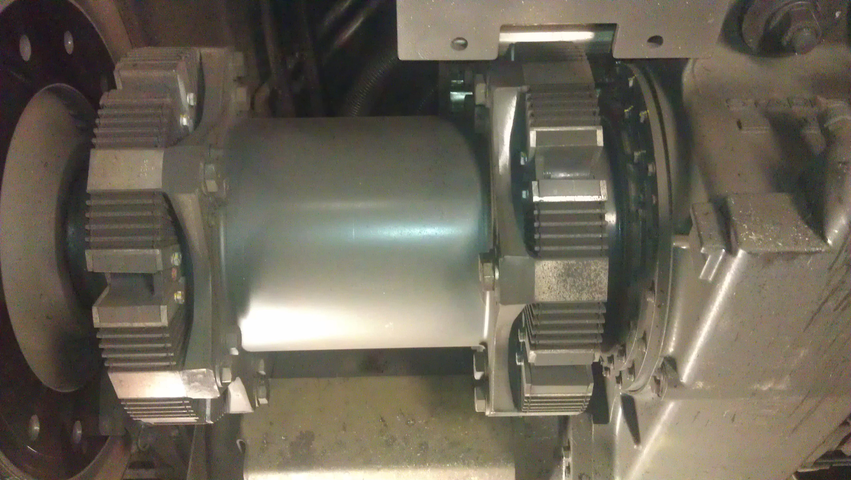 Hohlwellenantrieb eines Stadler KISS mit Keilpaketkupplung, rechts der Getriebekasten, links die Radscheibe